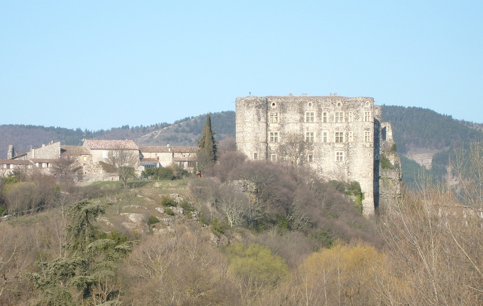 Château d'Alba-la-Romaine